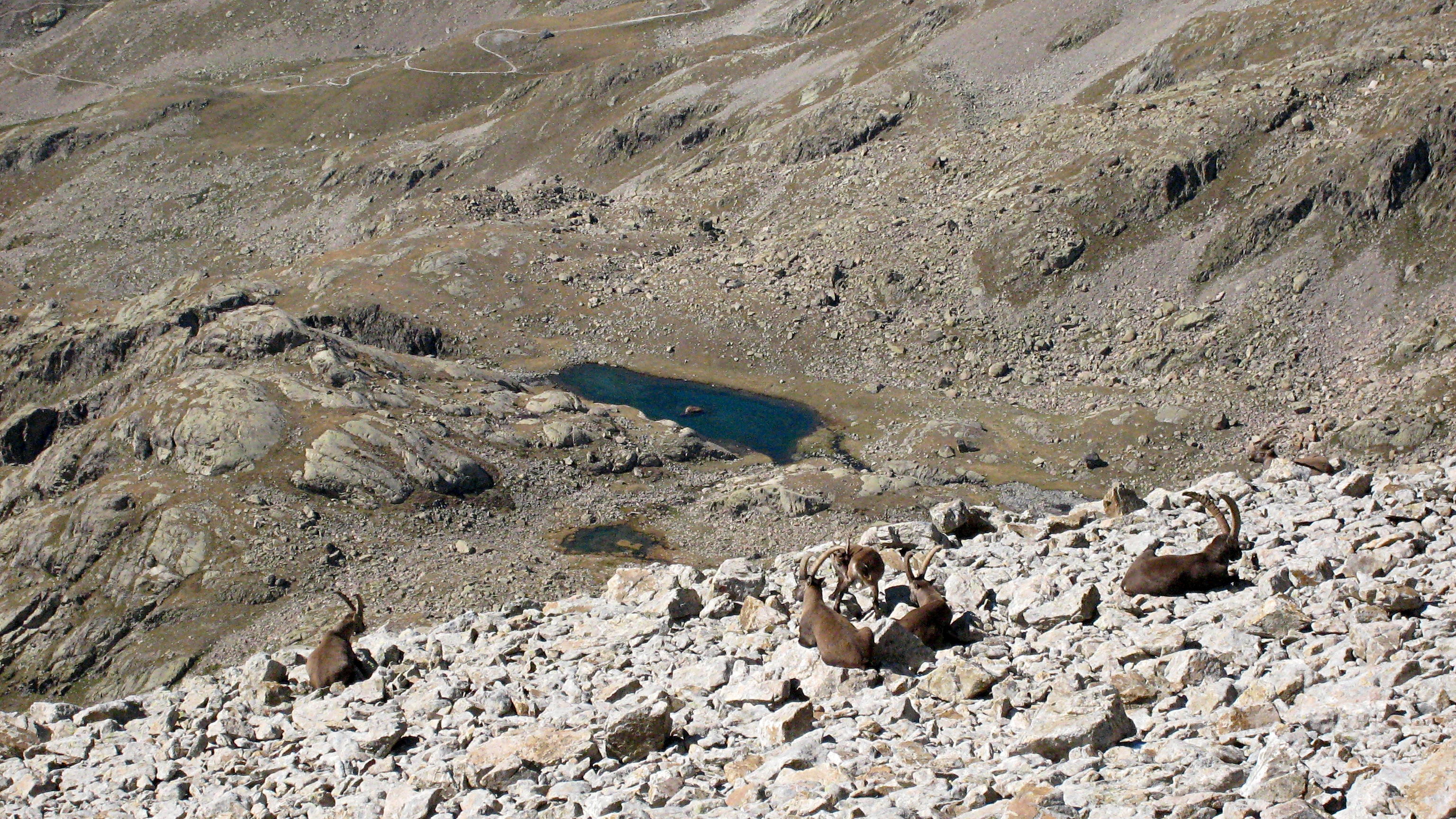 Lac Balaour, Parc du Mercantour